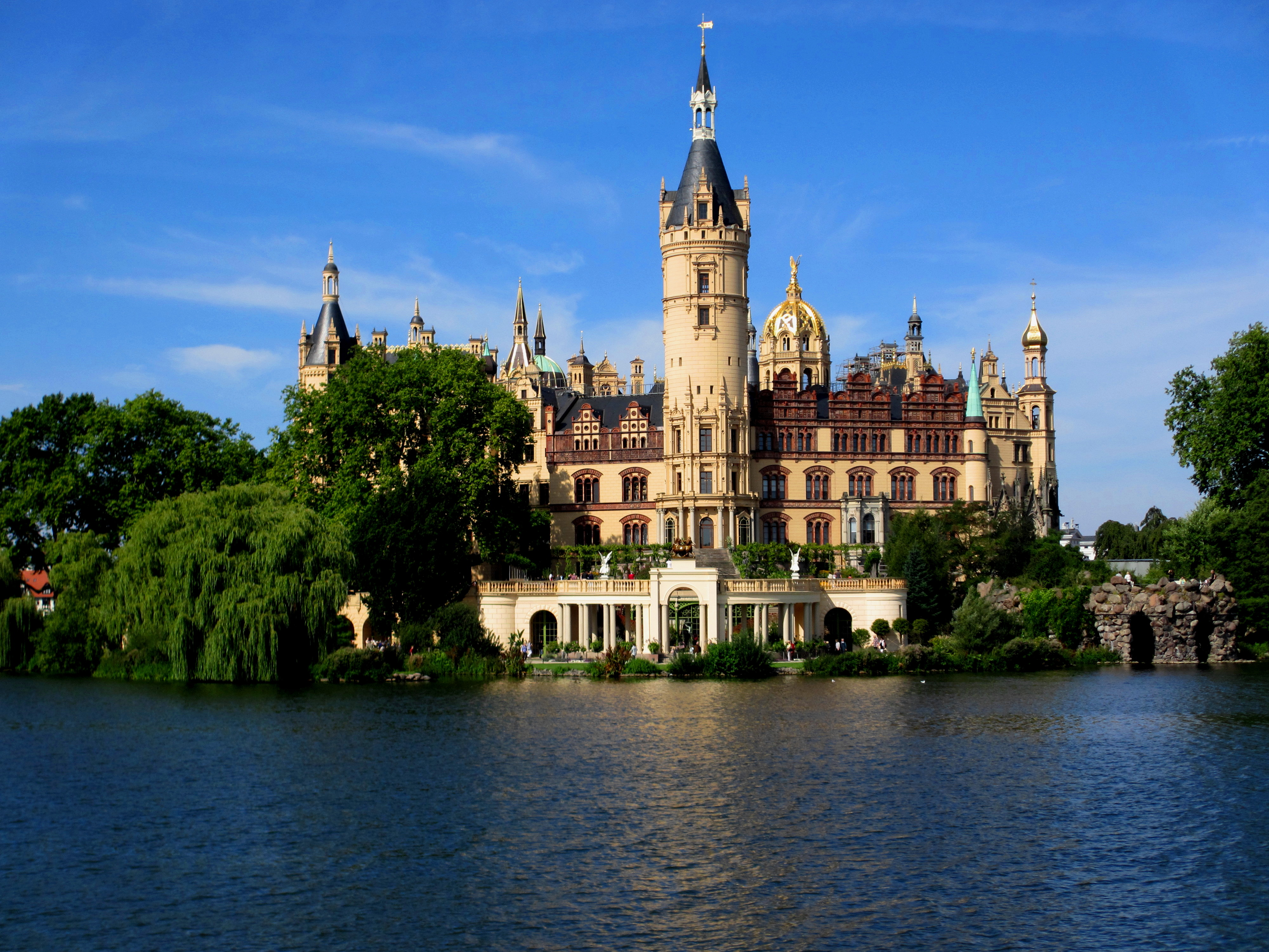 Schloss Schwerin, vom Schweriner See aus gesehen